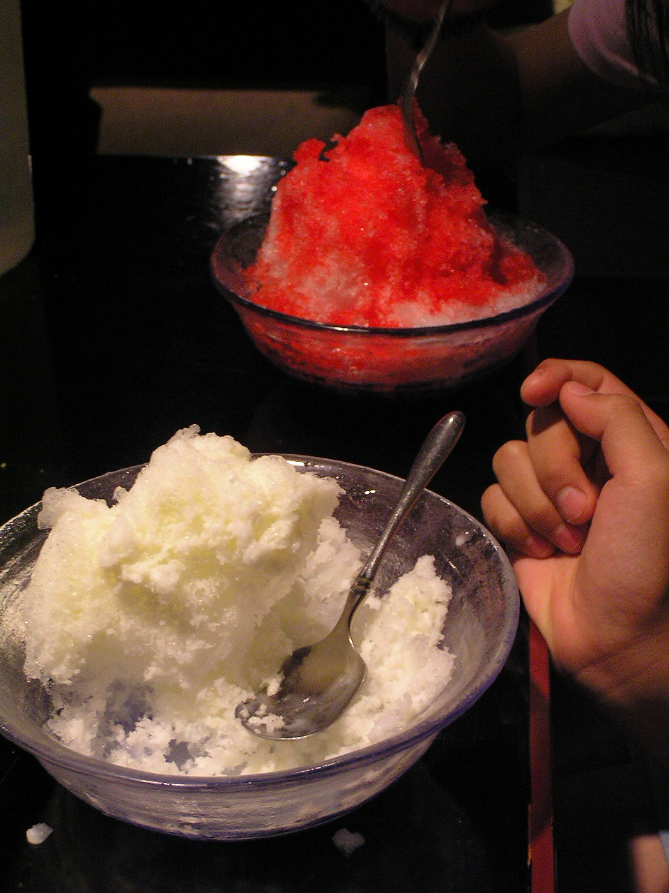 カキ氷ミルク&イチゴ